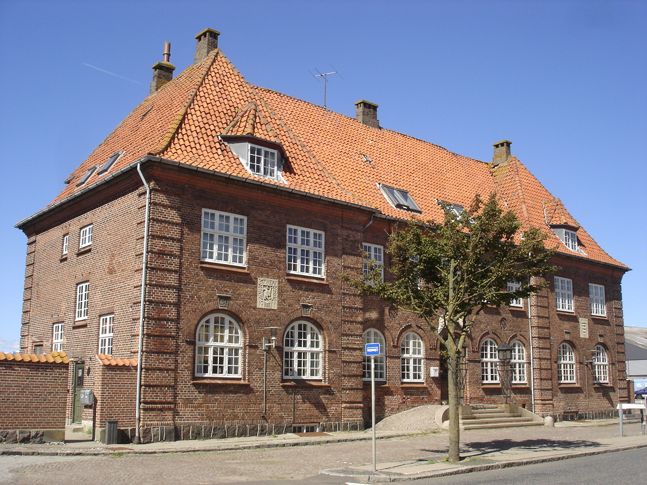 Rudkøbing Station fra vejside